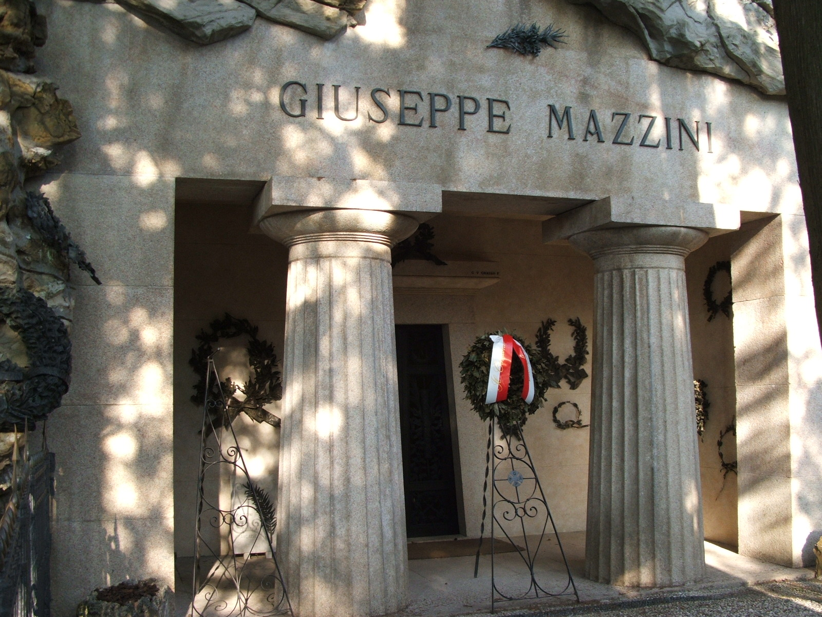 Tomba di Giuseppe Mazzini al Cimitero monumentale di Staglieno, Genova.